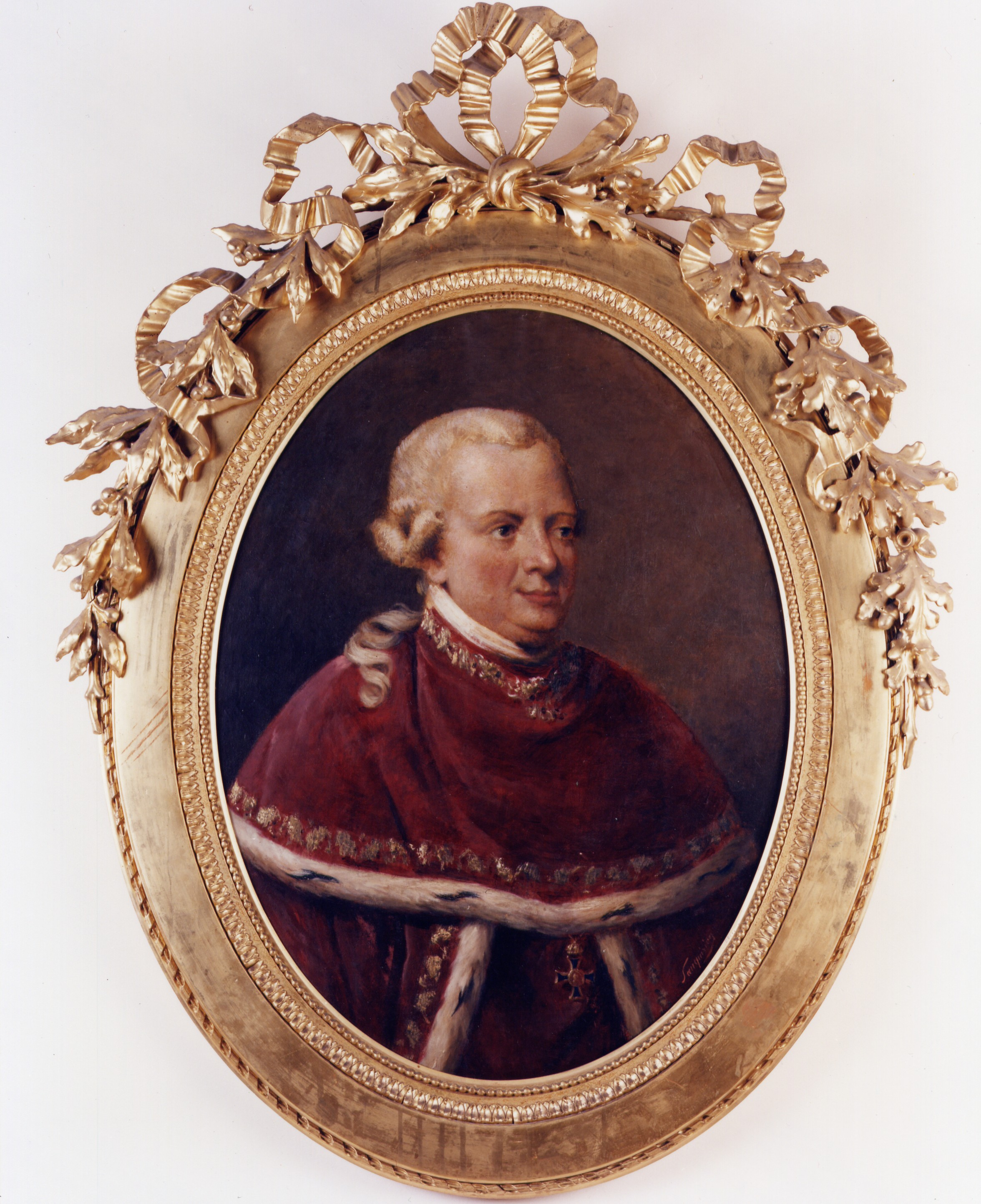 Ritratto del conte Antonio Greppi (A. Sanquirico)